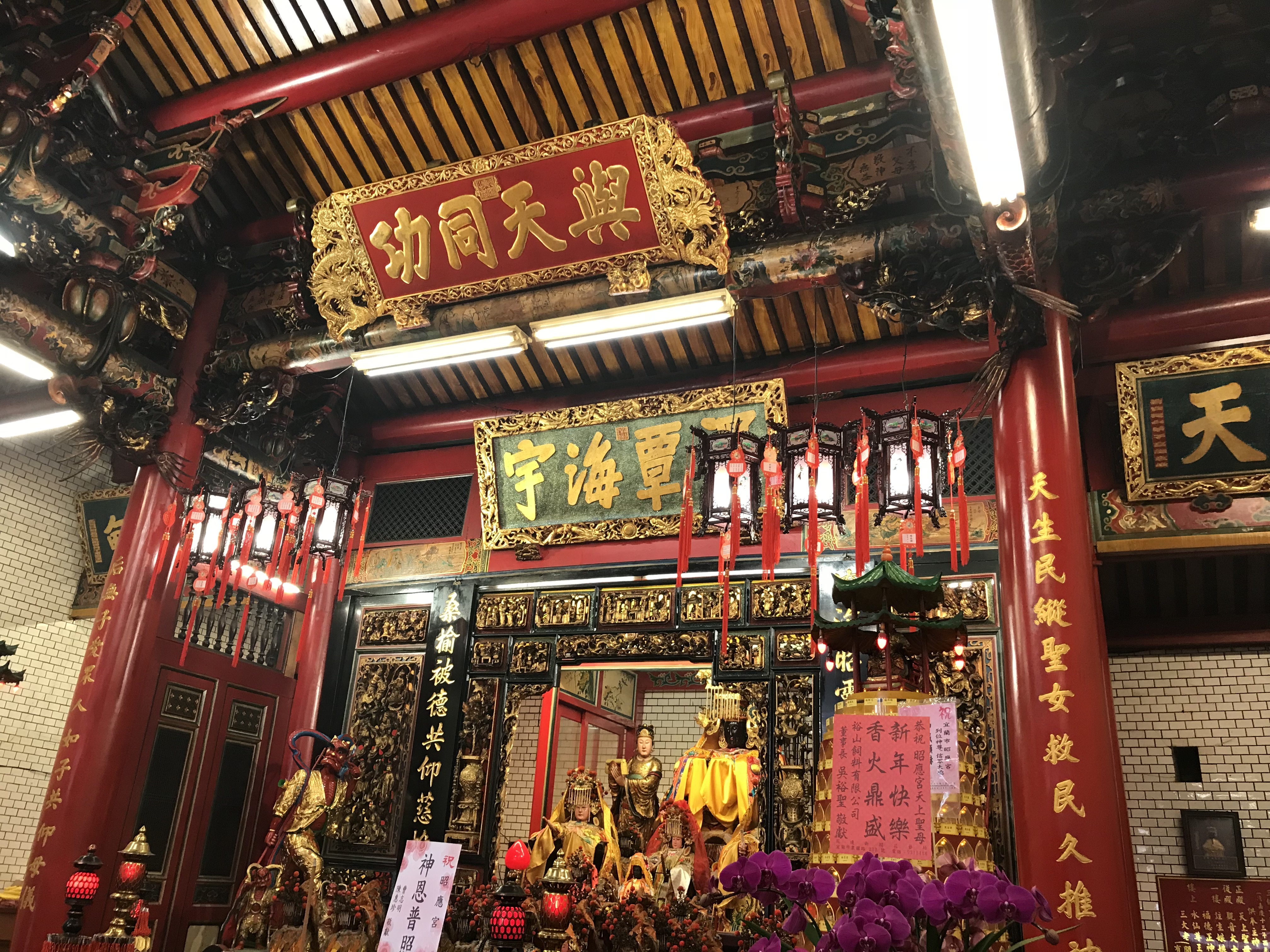 中文（台灣）: 昭應宮匾額與媽祖神像等